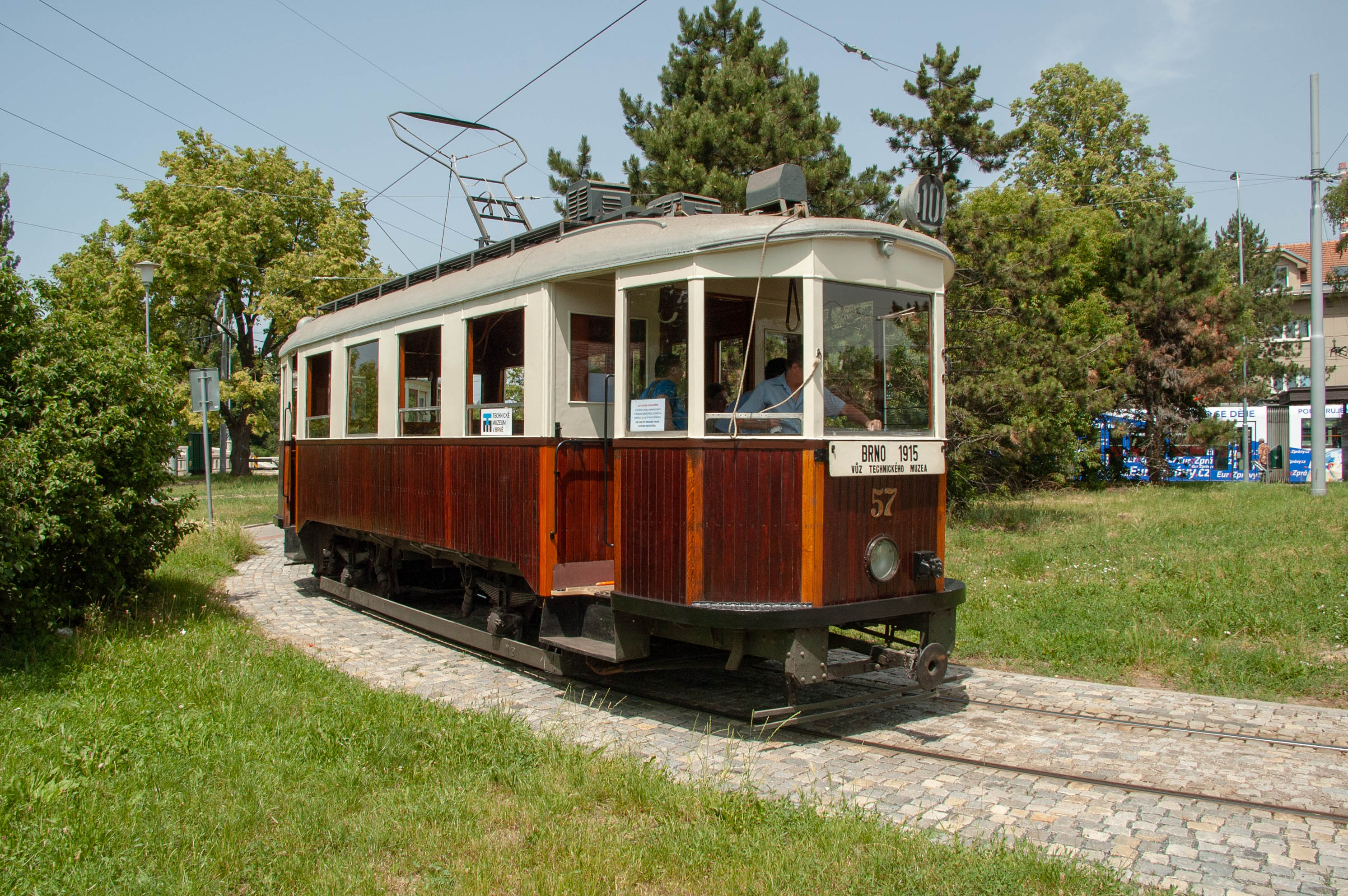 Dopravní nostalgie 2019 – tramvaj ev. č. 57